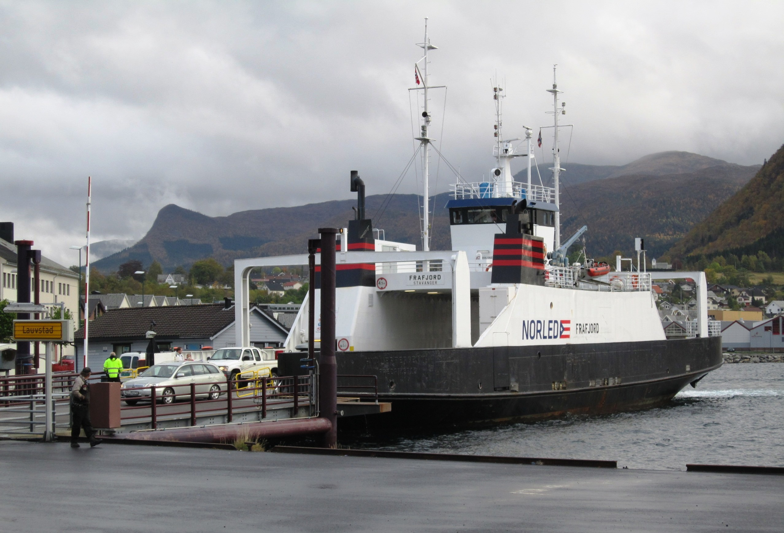 MF Frafjord i Volda, oktober 2013. Fergen gikk da i trafikk mellom Volda og Lauvstad.